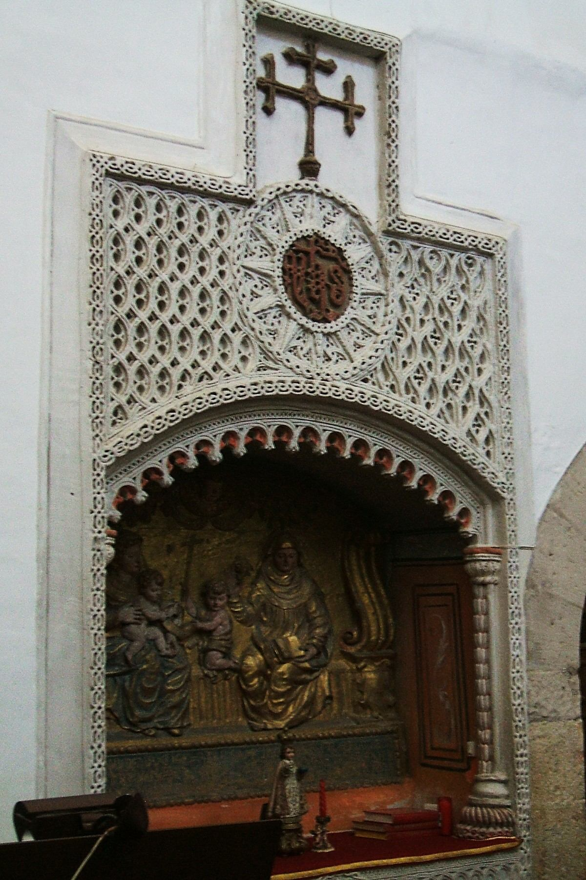 Sepulcro de estilo Cisneros (S-XVI) en el coro de las monjas del Real Monasterio de Nuestra Señora de la Consolación (MM Clarisas Franciscanas), Calabazanos, Palencia, Castilla y León, España